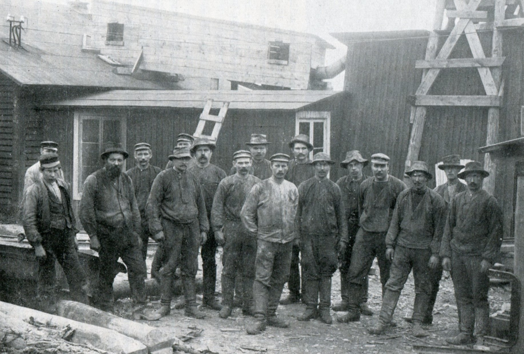 Norsborgs vattenverk, arbetsstyrkan för bygget